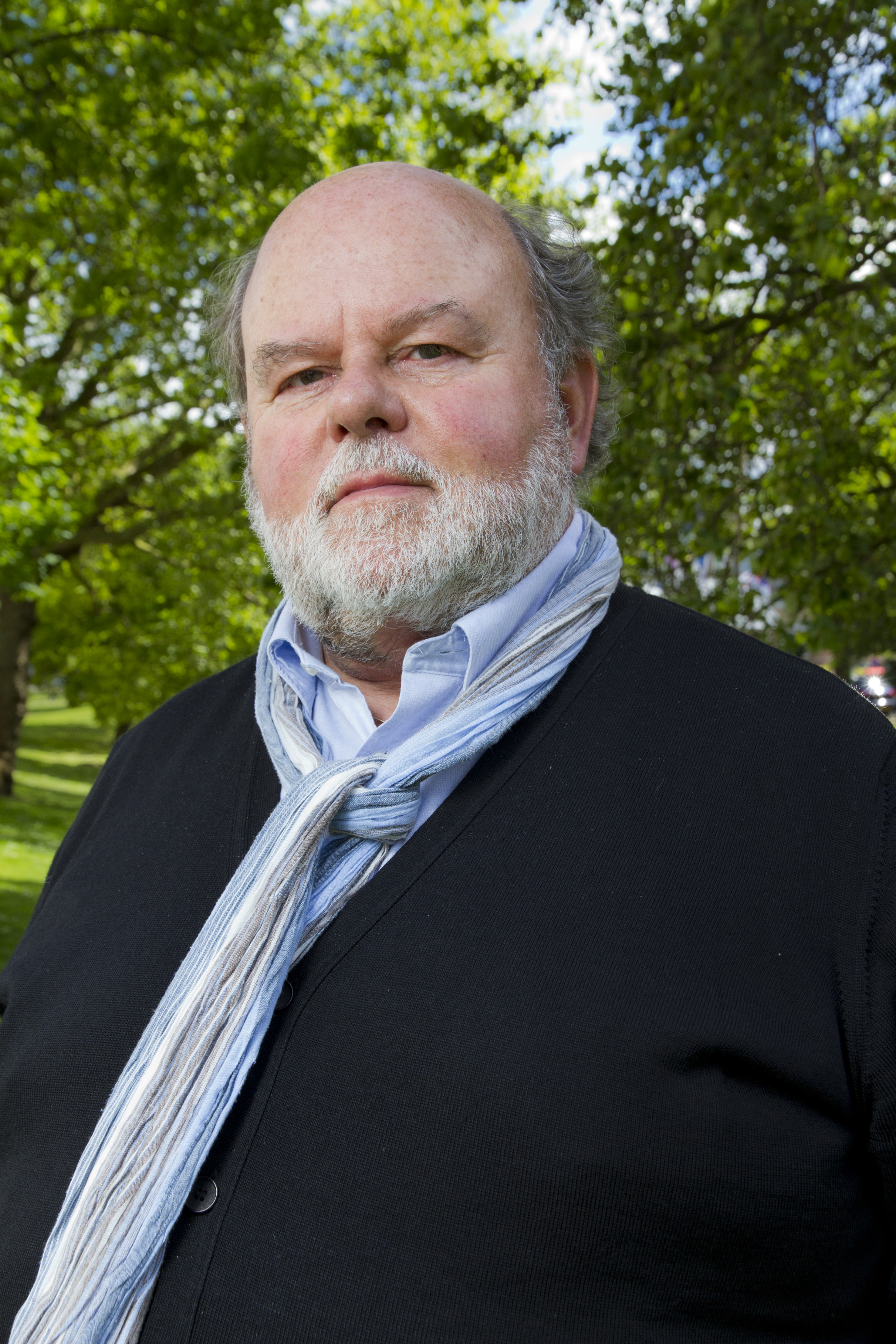 Mathieu Weggeman